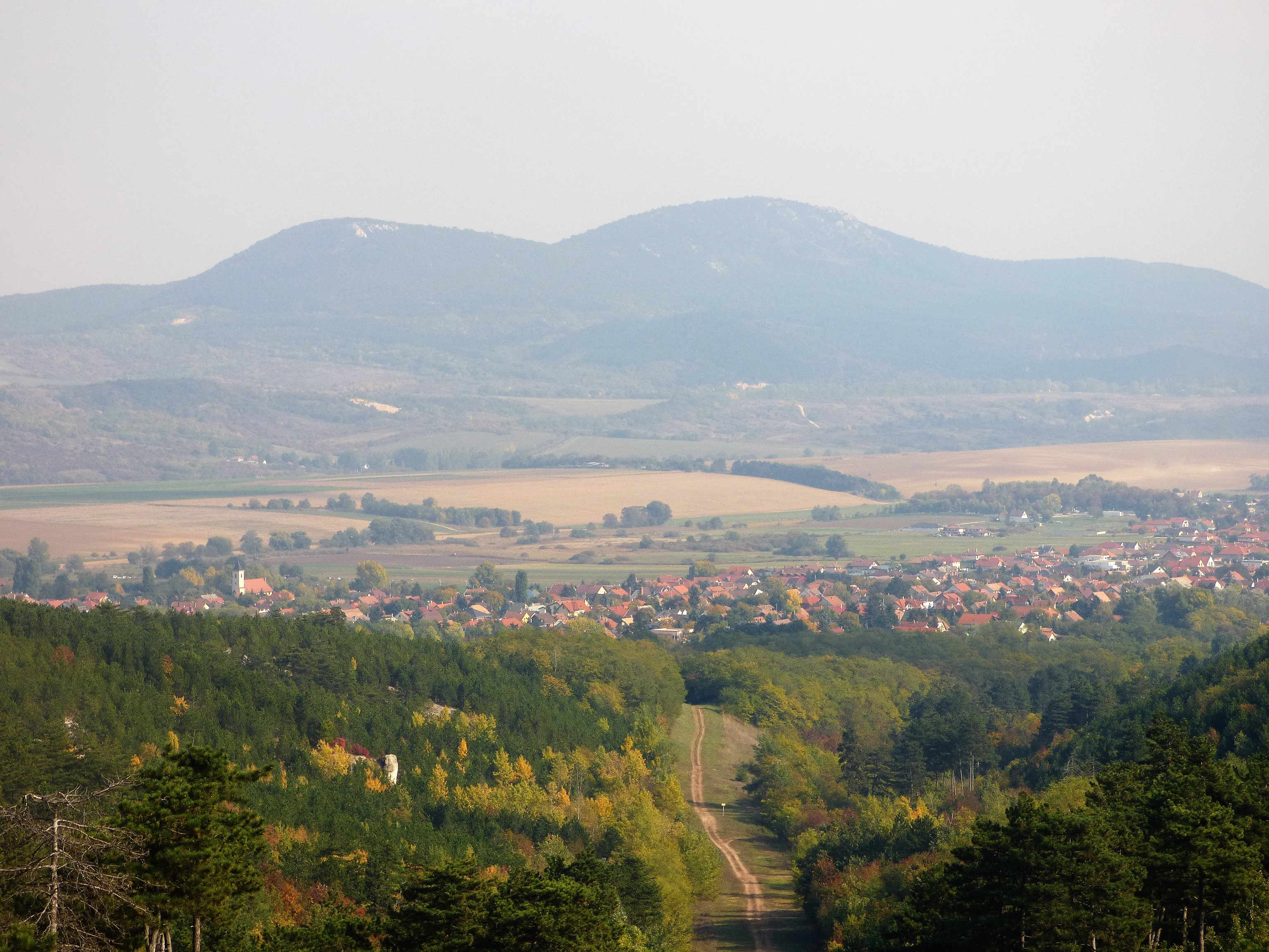 A Kevélyek, a Zajnát-hegyek,-a Pilis hegység déli része,-felől nézve